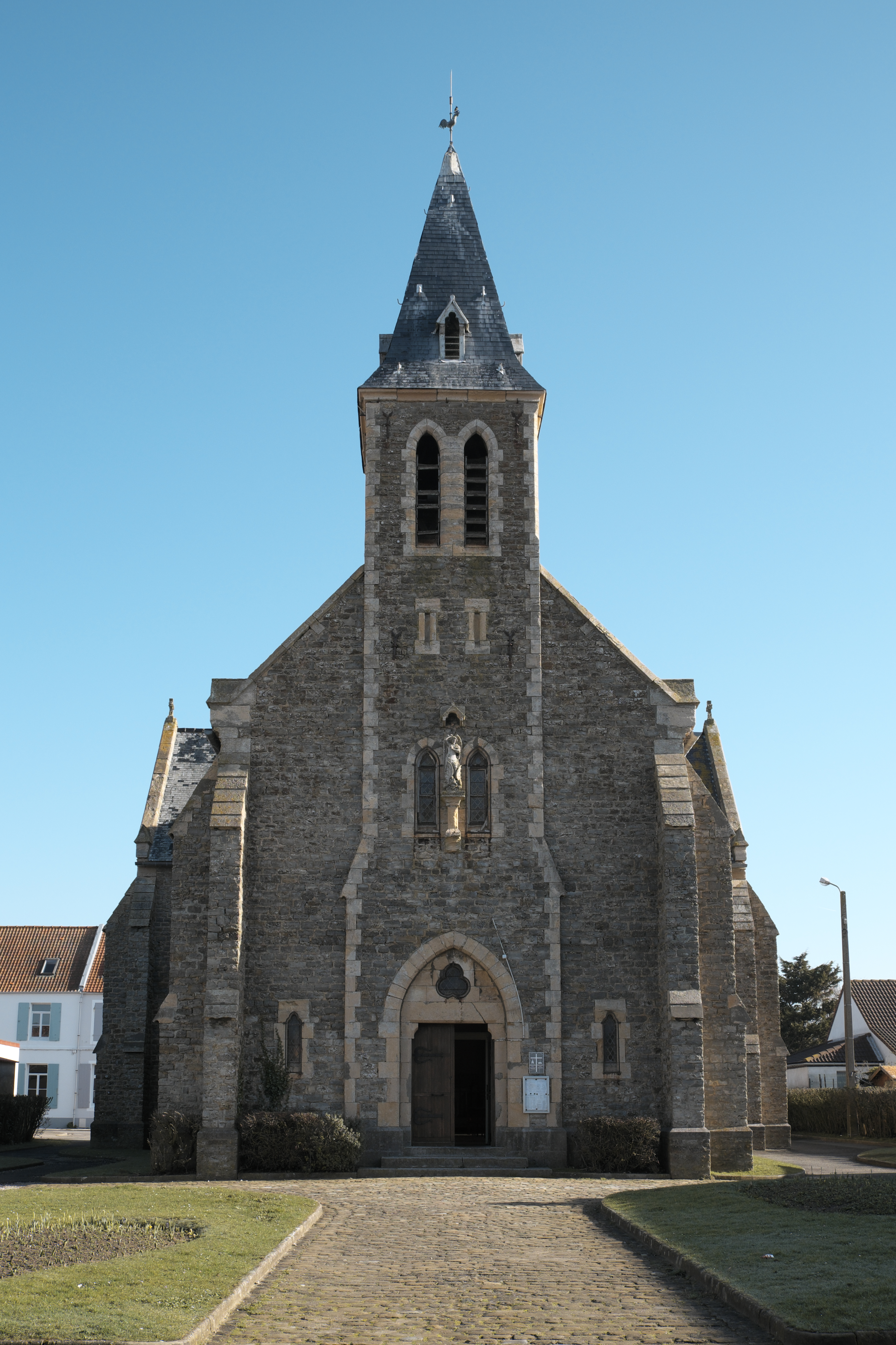 Katholische Kirche Saint-Michel in Ambleteuse im Département Pas-de-Calais (Hauts-de-France/Frankreich)